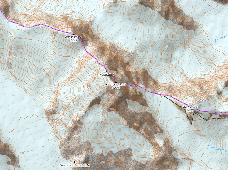 carte réalisée sur umap This map may be incomplete, and may contain errors. Don't rely solely on it for navigation.